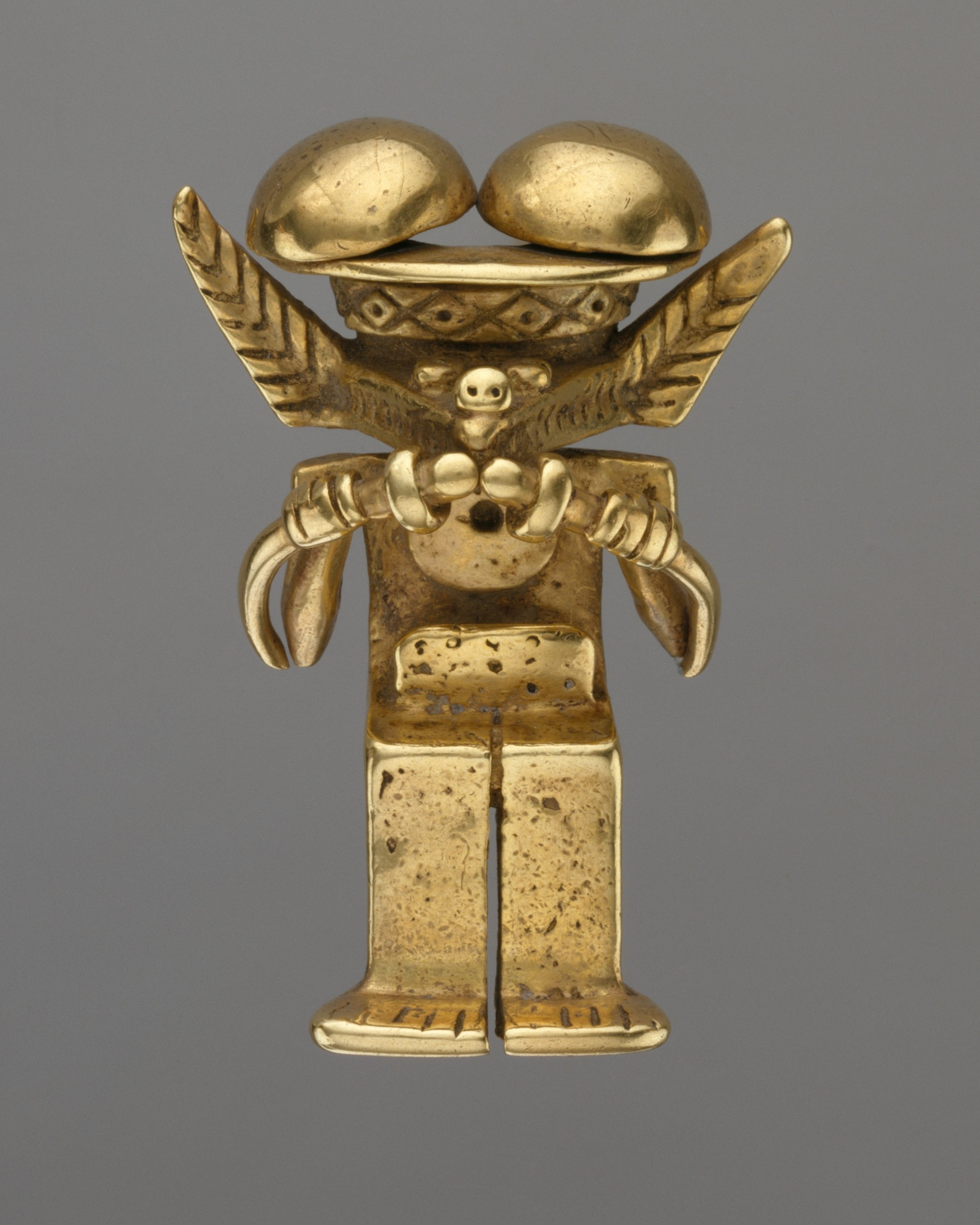 Calima (Yotoco); Pendant; Metal-Ornaments